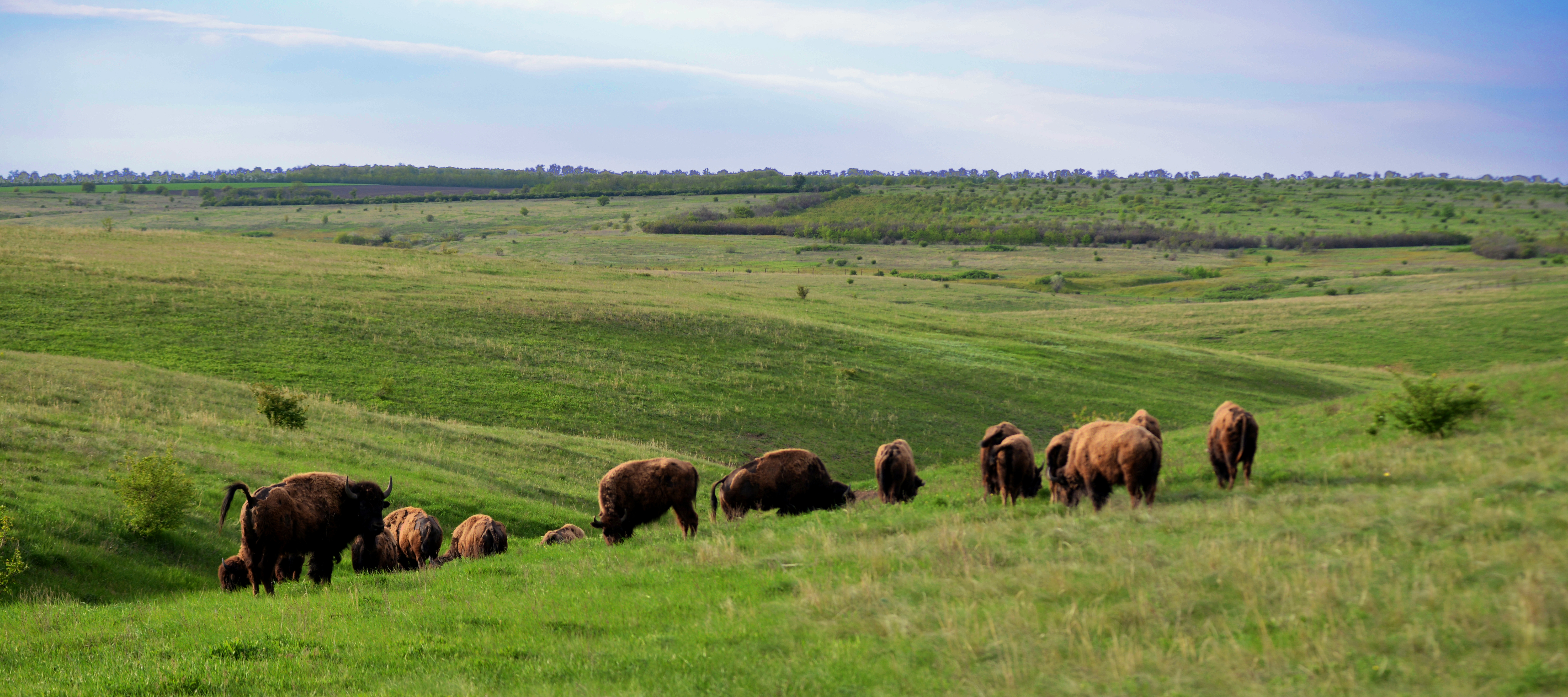 Єланецький степ, Єланецький, Новоодеський р-ни